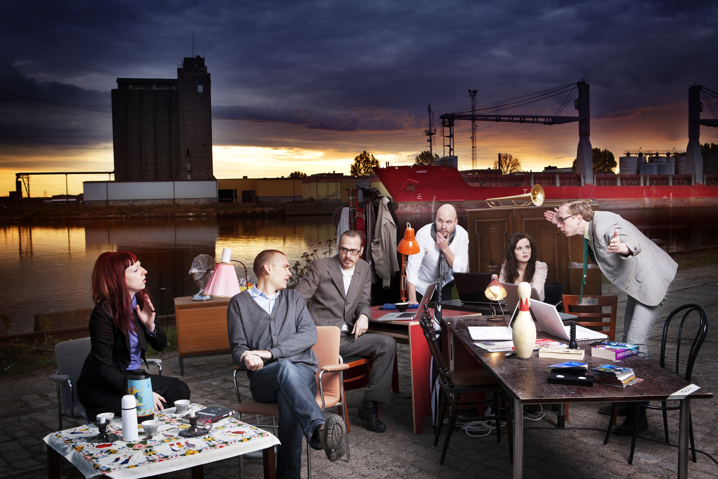 Gruppbild på medlemmarna i humorsajten Rikets sal. Från vänster: Josefin Johansson, Jesper Rönndahl, Valle Westesson, Benny Mårtensson, Nanna Johansson och Kringlan Svensson.